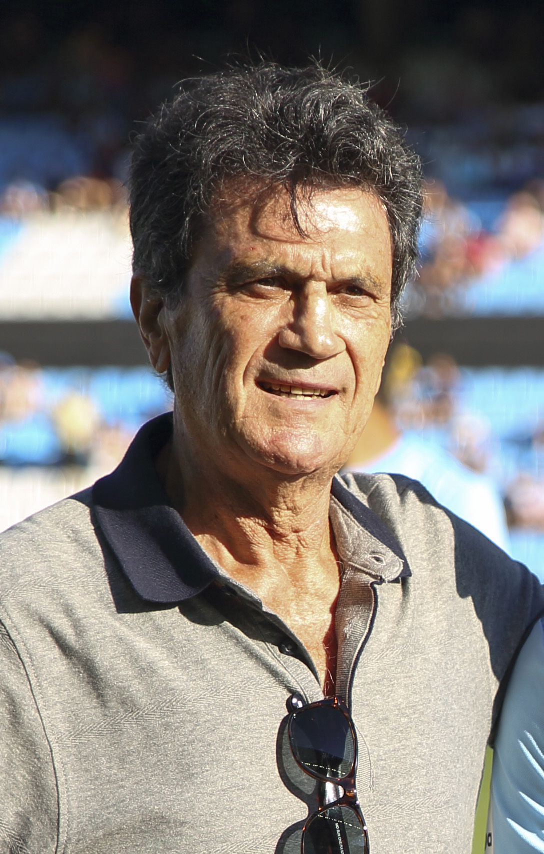 Presentación RC Celta - Temporada 18/19